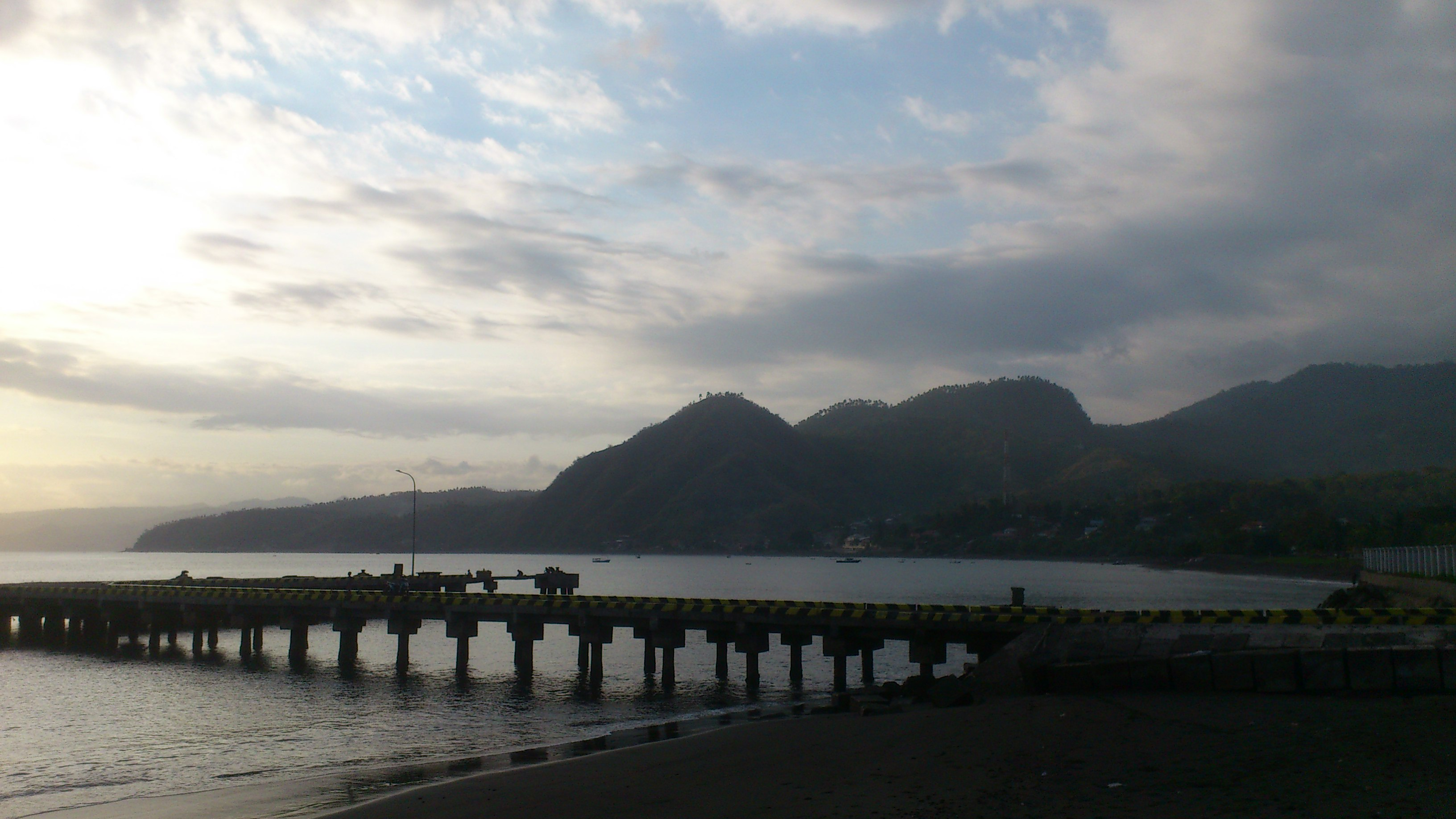 Pemandangan Pelabuhan Bung Karno yang terletak di Ende, Pulau Flores, Nusa Tenggara Timur.